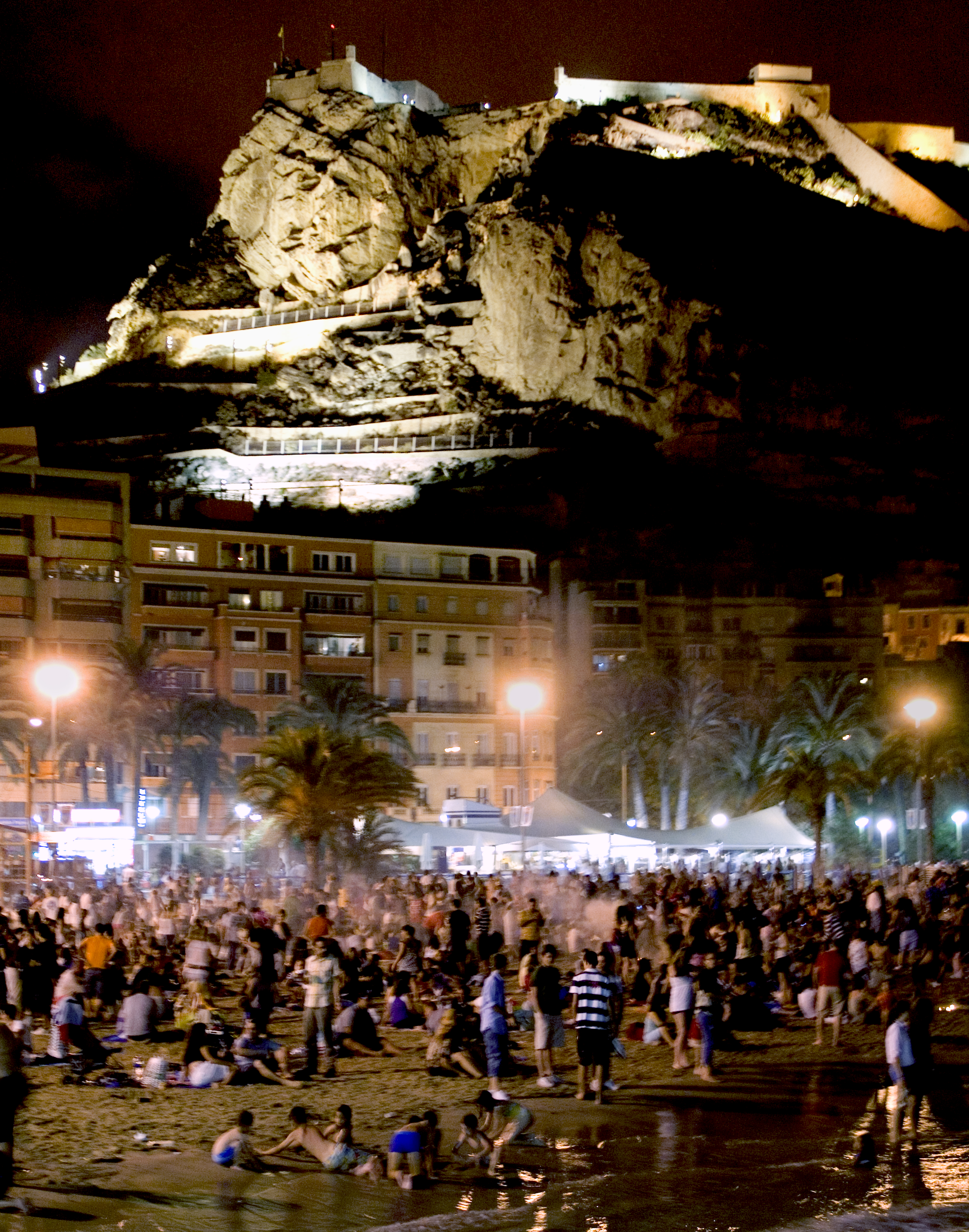 La noche de San Juan, vista del Postiguet y el Castillo